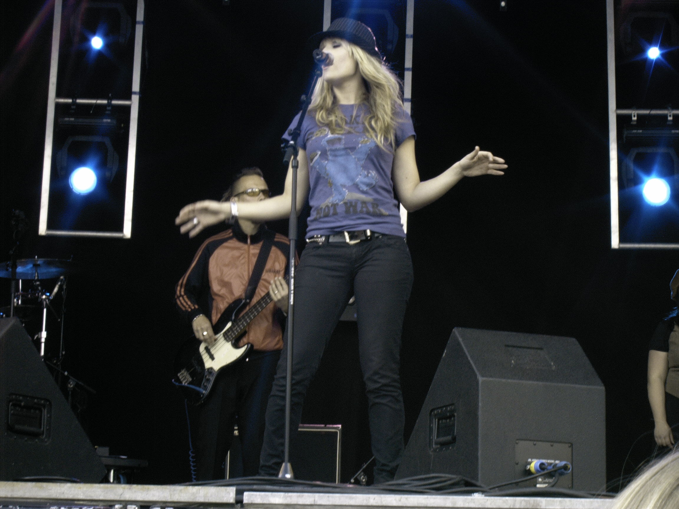 Dennis (Denise van Donselaar) live @ arnhem 30-04-2008